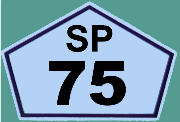 Placa da rodovia SP-75, São Paulo, Brasil